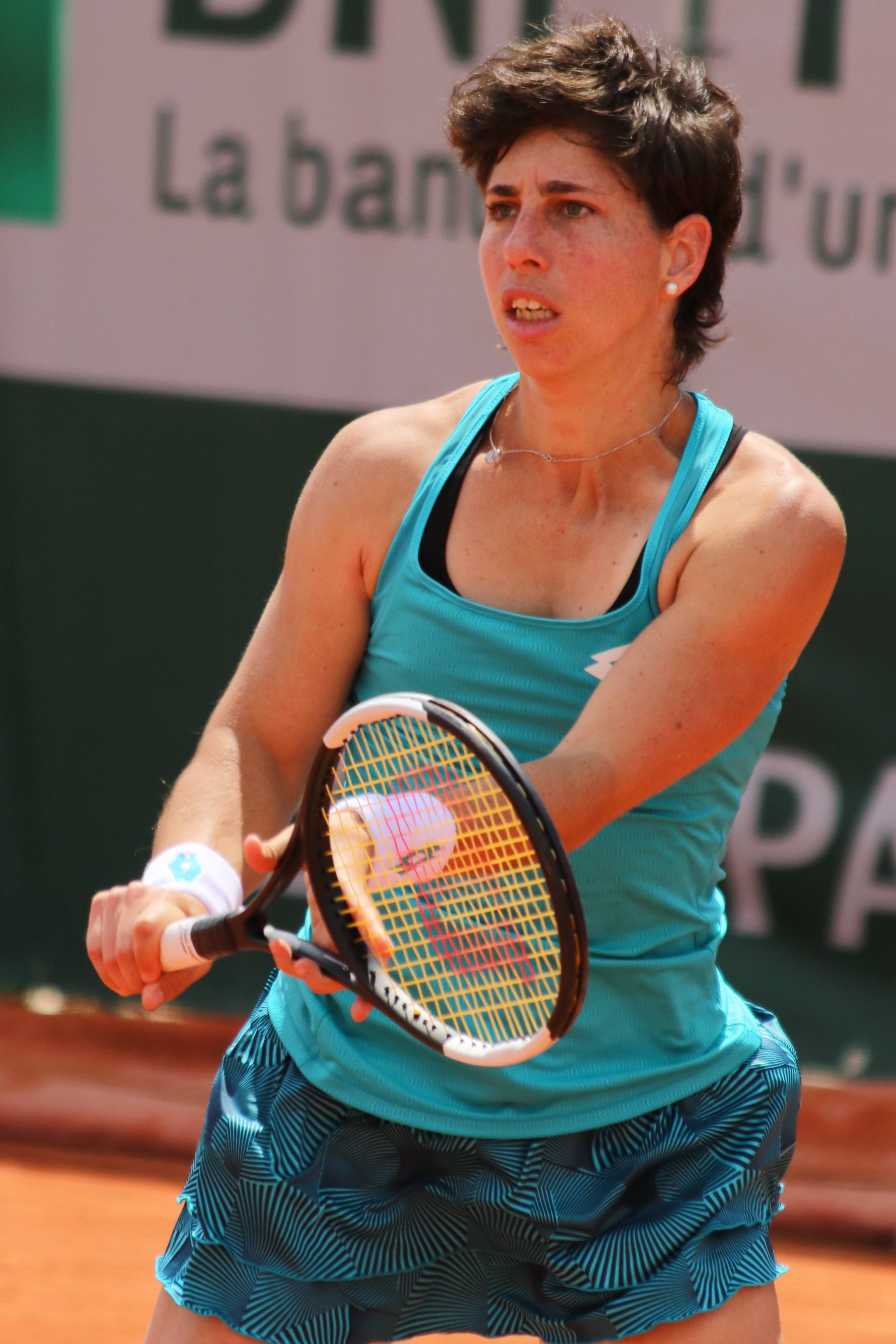 Suarez Navarro RG19 (7)